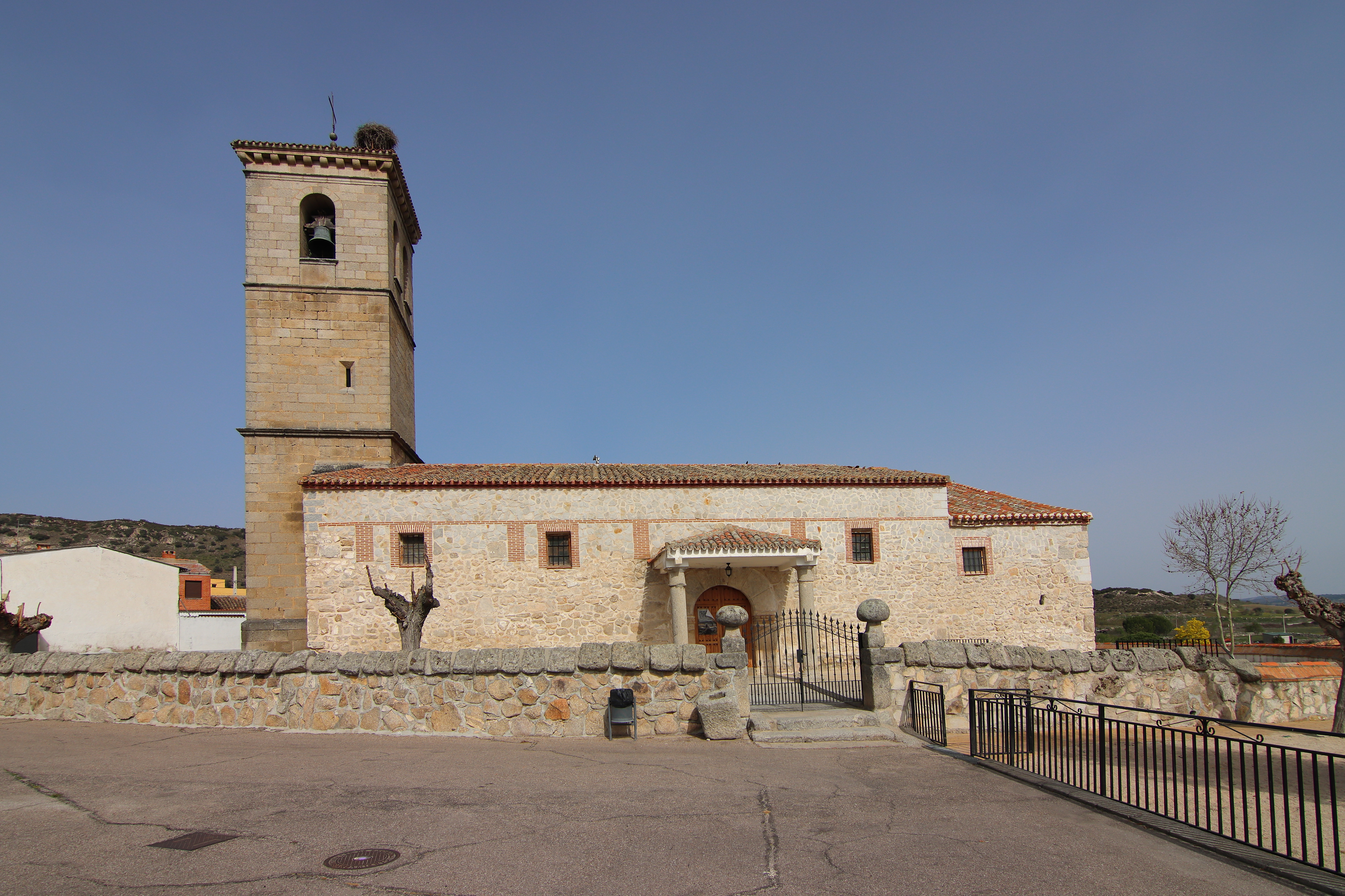 Iglesia de San Vicente Mártir, Paredes de Escalona, fachada principal, sur